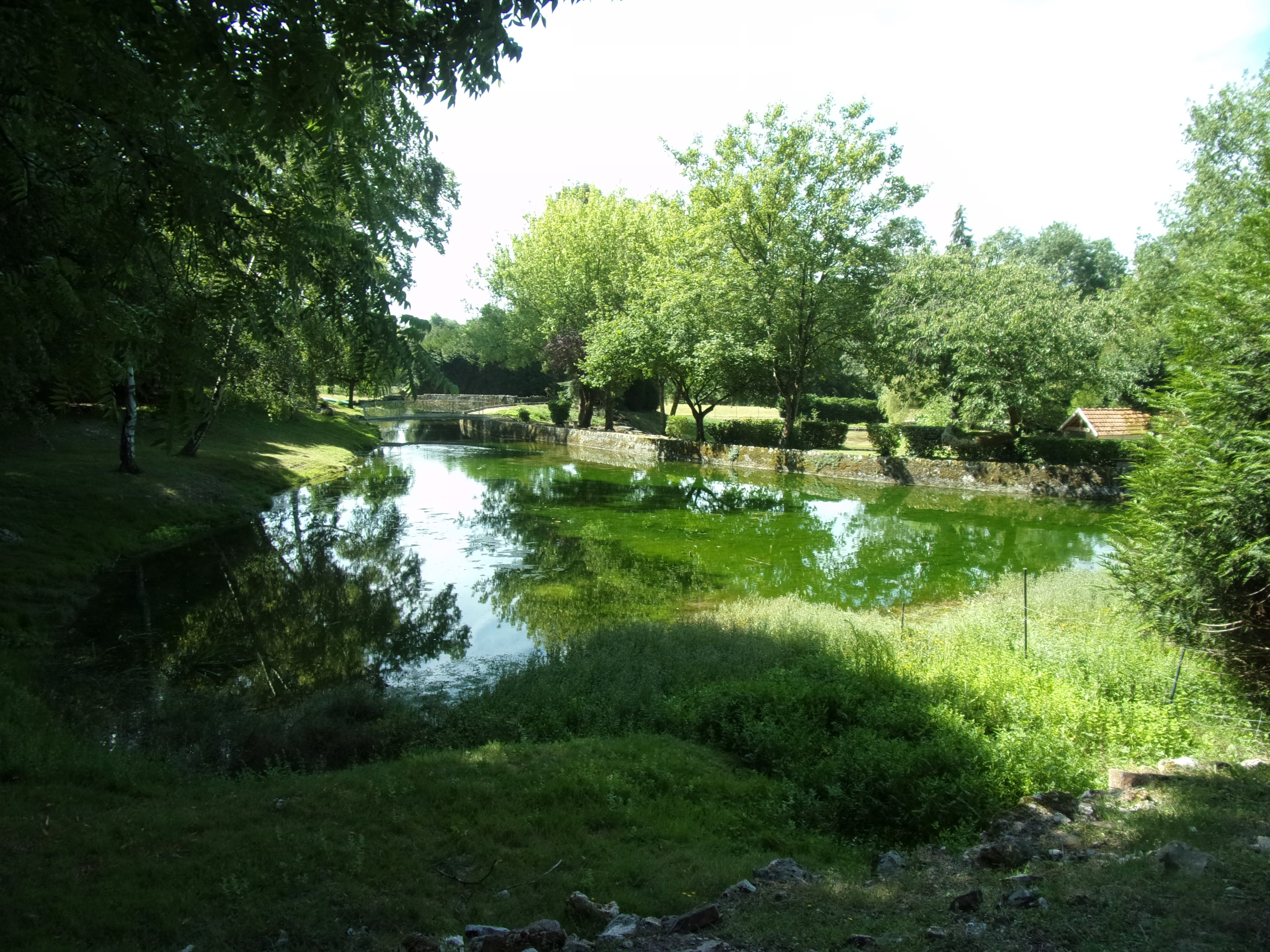 Fontaines d'Avon à Esvres